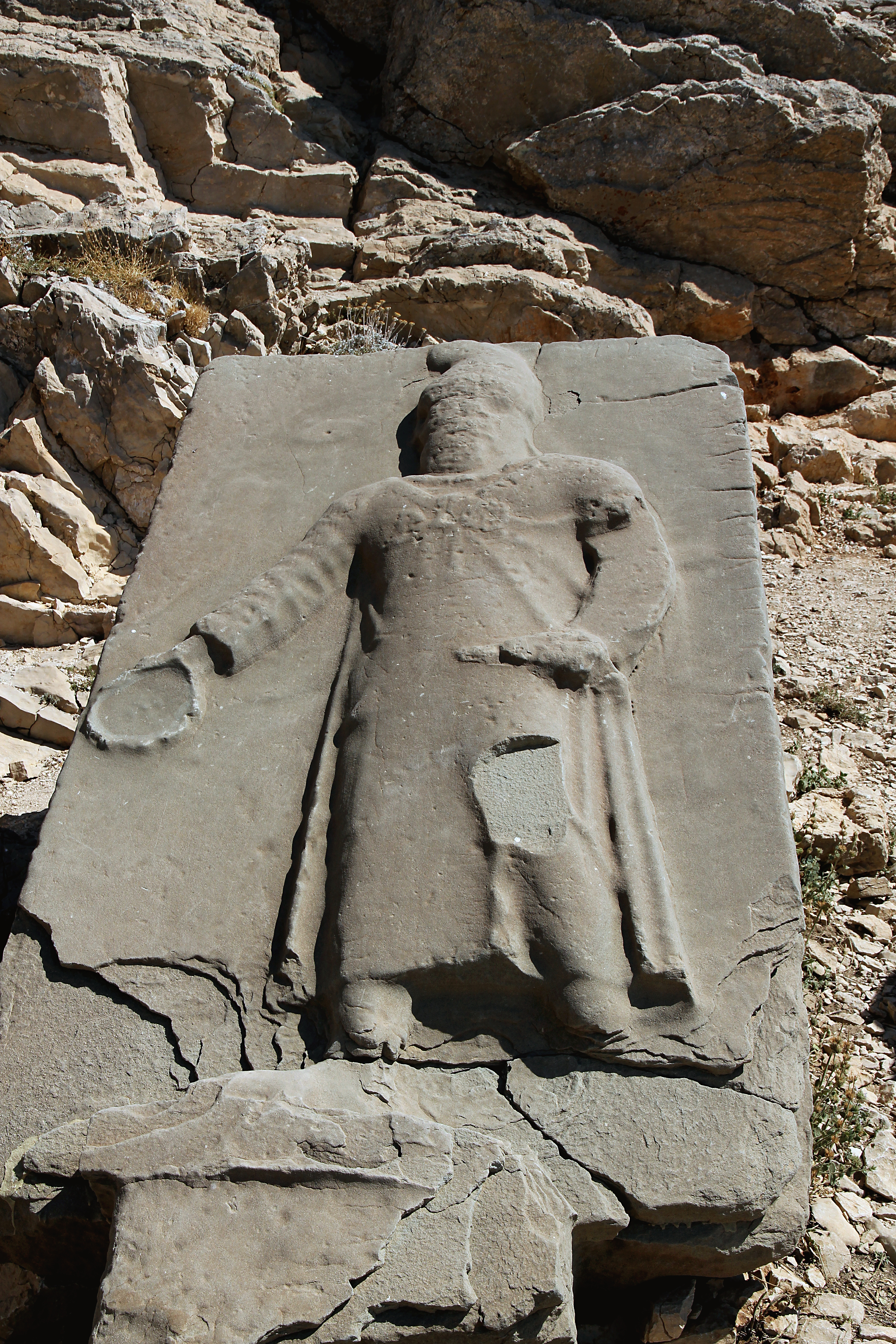 Relief des persischen Vorfahren Darius I., Nemrut Dağı, Südosttürkei, Westterrasse